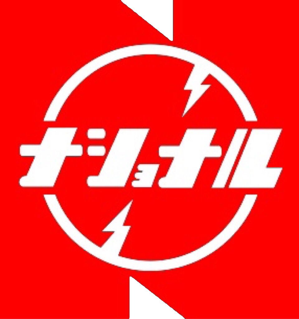 松下電器産業のNマーク